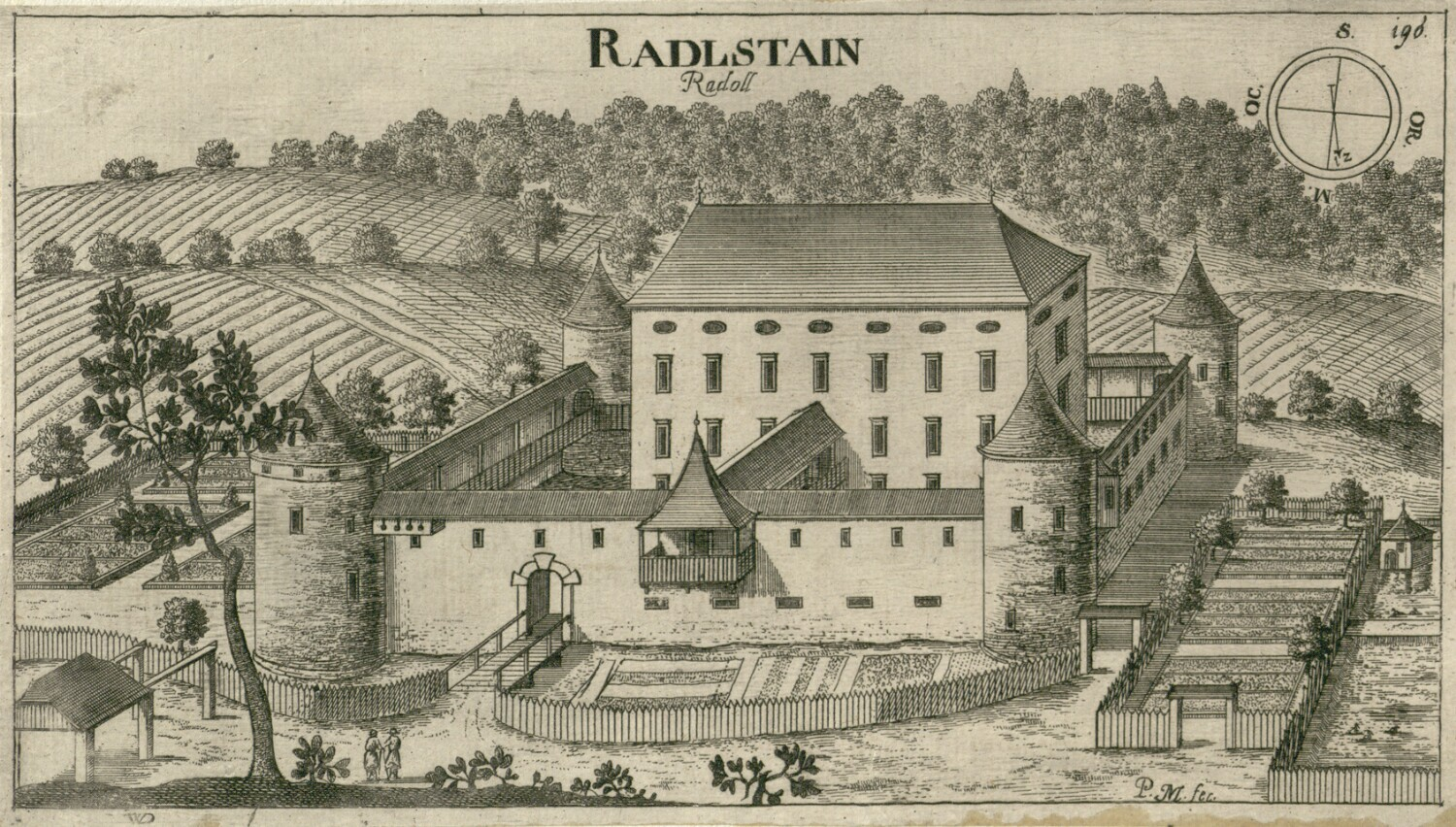 Grad Radeljca